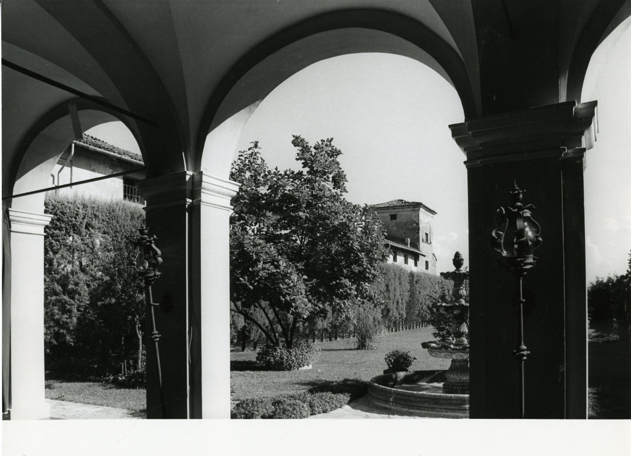 Servizio fotografico : Gossolengo, 1981 / Paolo Monti. - Stampe: 7 : Positivo b/n, gelatina bromuro d'argento/ carta, 24x30. - ((Al verso delle stampe manoscritti i numeri dei negativi corrispondenti: 90/22, 92/1, 92/6, 92/8, 92/11, 92/20, 92/24. Sul coperchio della scatola, manoscritto a pennarello: "Città Storiche/ Piacenza". - Occasione: Documentazione di antiche ville nel territorio (secondo accordi con il Signor Tirotti). - Fonte: Fattura di Paolo Monti: IV. Commesse/ Fattura n. 44/ Riprese fotografiche antiche ville nel territorio di Piacenza (1981/12/30), presso Archivio Paolo Monti. N. 140 riprese stampate in formato 24x30